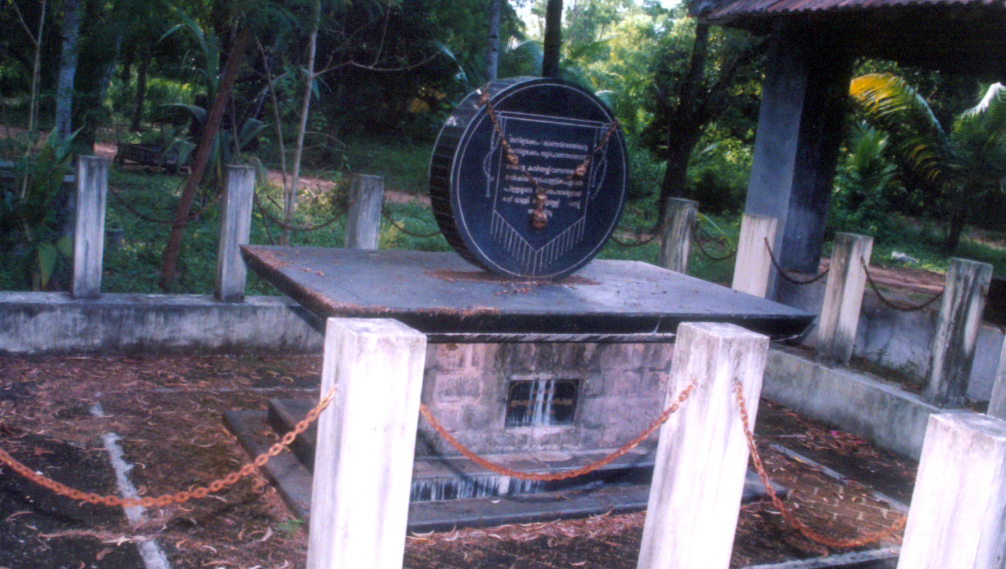 ഇടപ്പള്ളി സ്മാരകം